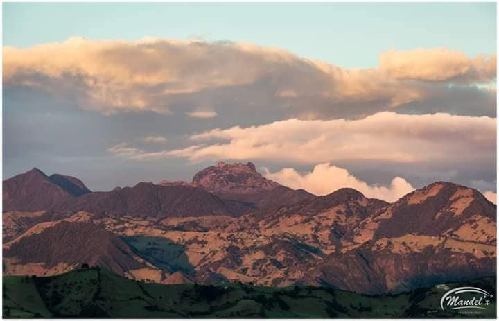 Volcán Petaca